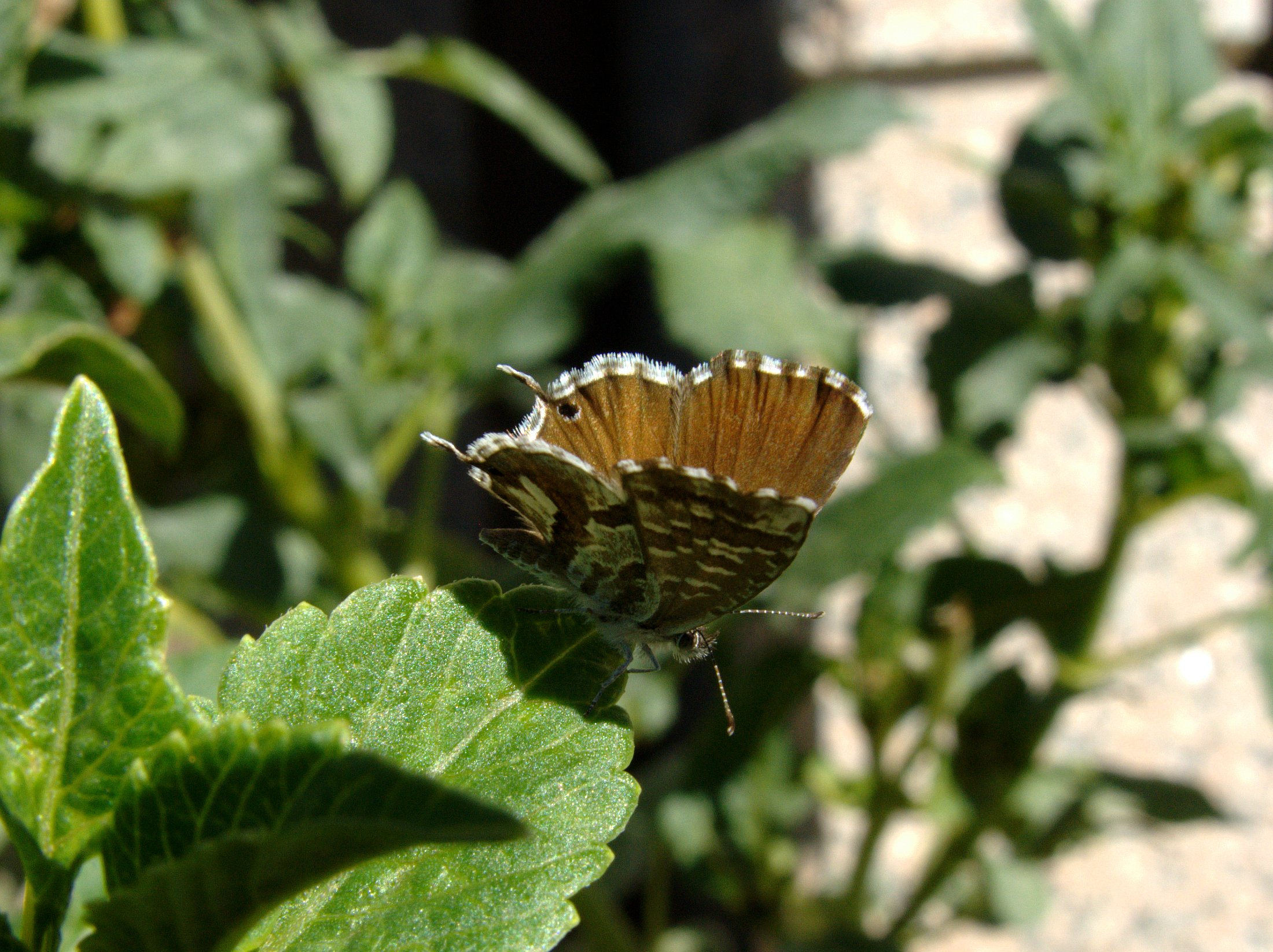 Cacyreus marshalli (Lycaenidae). Carracedo del Monasterio, Bierzo, León, España.